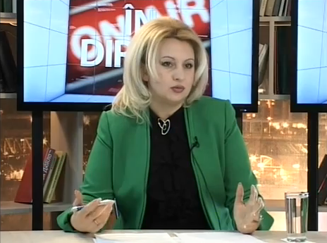 Violeta Ivanov